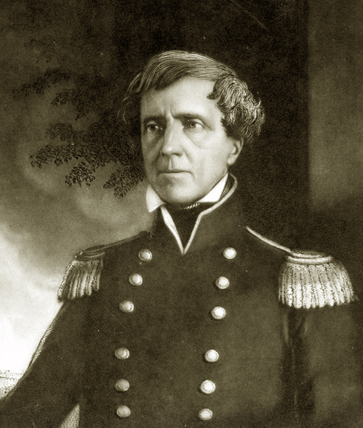 Brigadier-General Stephen W. Kearny (1794-1848)